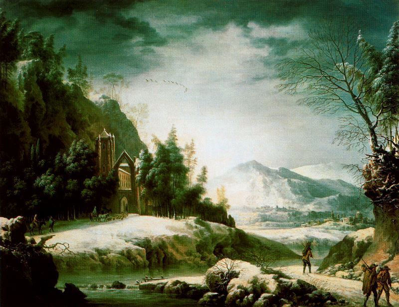 Paisaje invernal en los Apeninos con templo en ruinas,title QS:P1476,es:"Paisaje invernal en los Apeninos con templo en ruinas," label QS:Les,"Paisaje invernal en los Apeninos con templo en ruinas,"